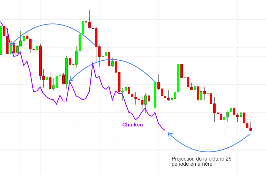 Ichimoku - Chinkou